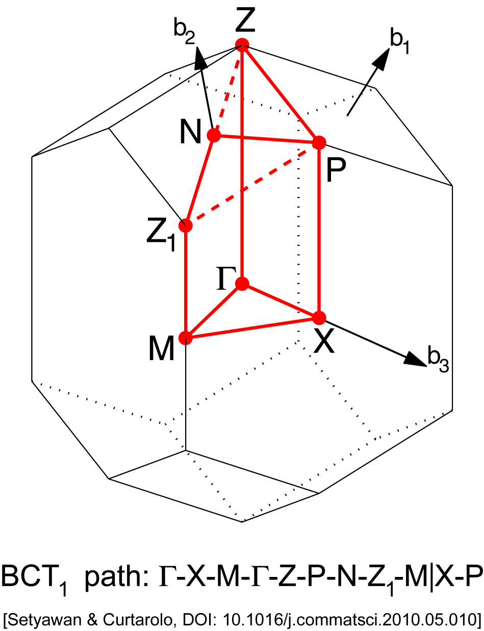 Curtarolo, consortium